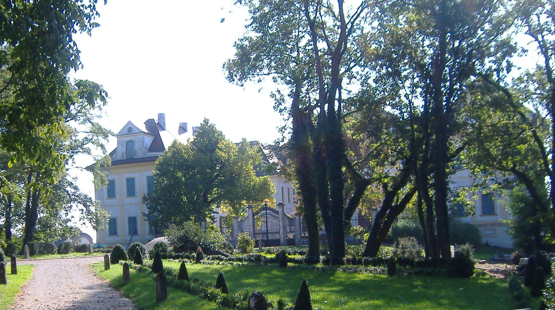 Schloss Bertholdsheim